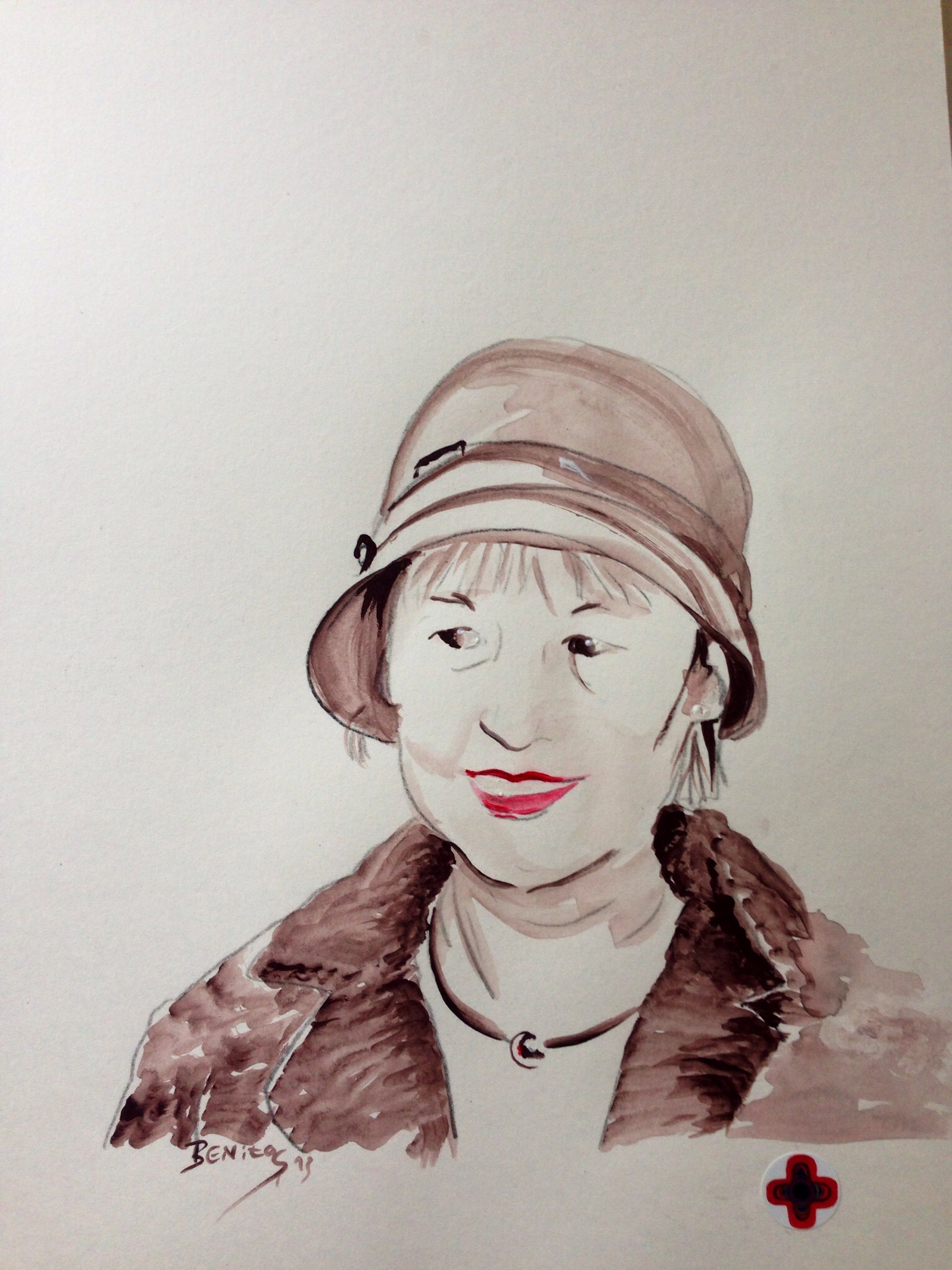 Ingrid Mössinger Porträt gemalt von Dr. Benita Martin ADA Dimensionsmalerei ®